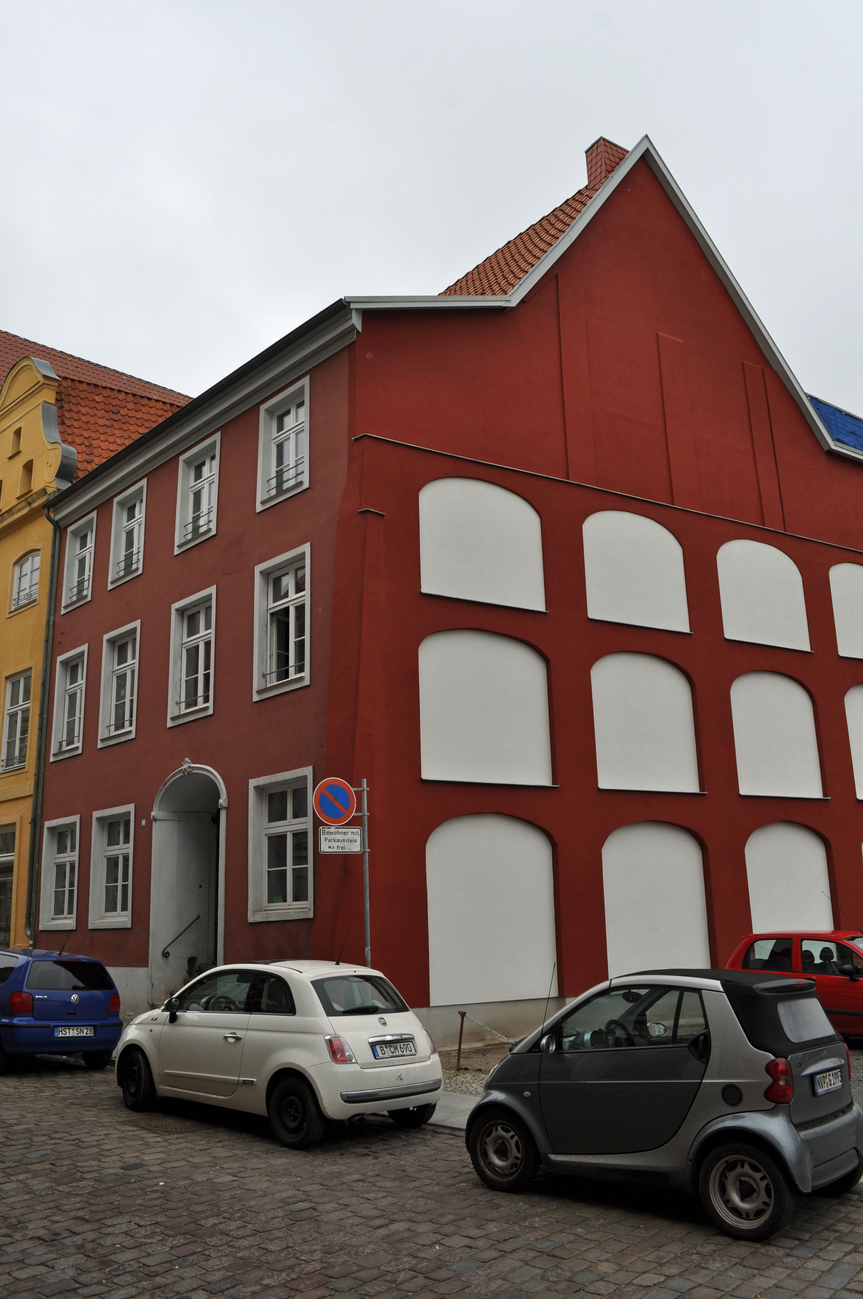 Gebäude bzw. Gebäudedetail in Stralsund. Straße und Hausnummer siehe Dateiname.